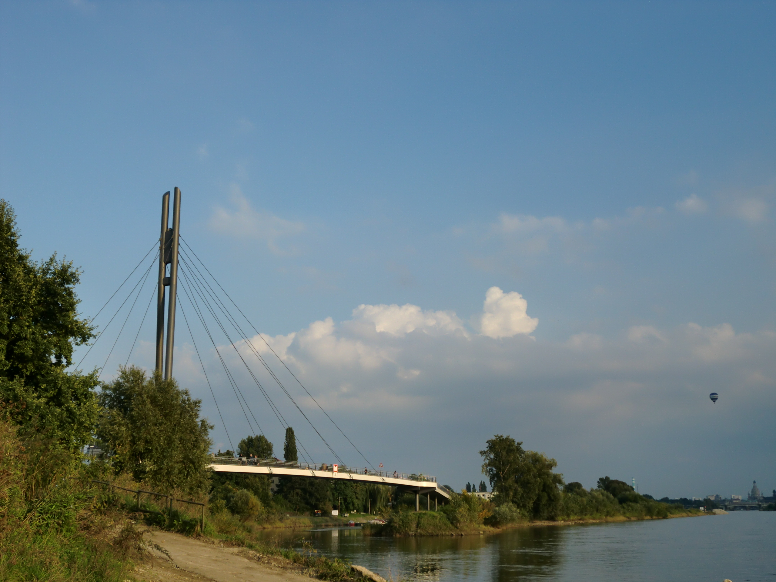 Die Molenbrücke in Dresden-Pieschen am Tag nach ihrer Eröffnung